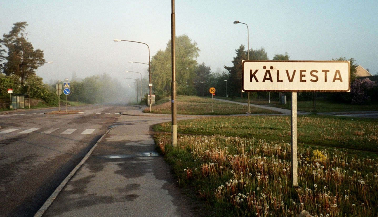 Obec Kälvesta v ranní mlze